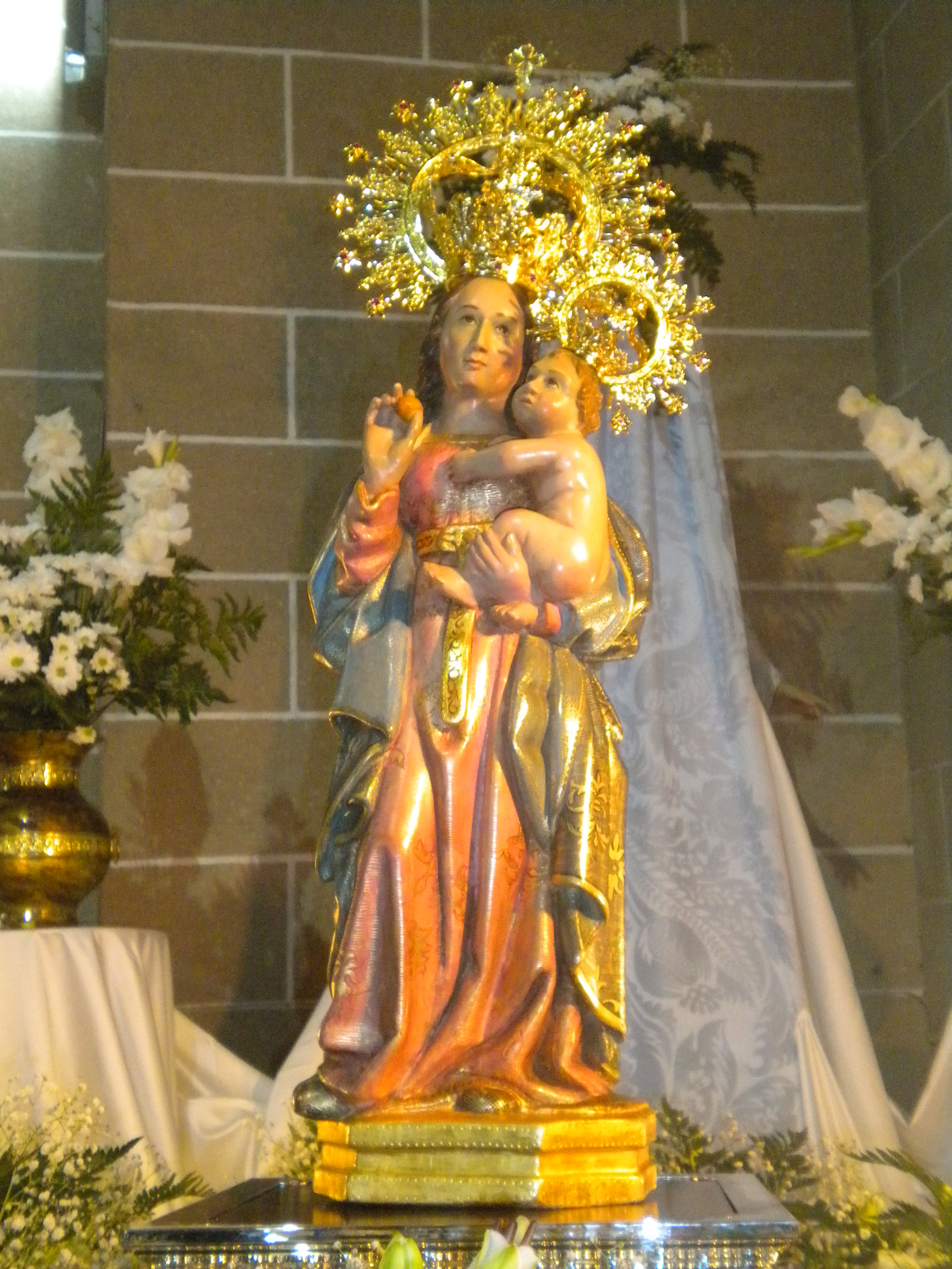 Talla del siglo XVI de Nuestra Señora del Río Tajo de Talaván (Extremadura, España)